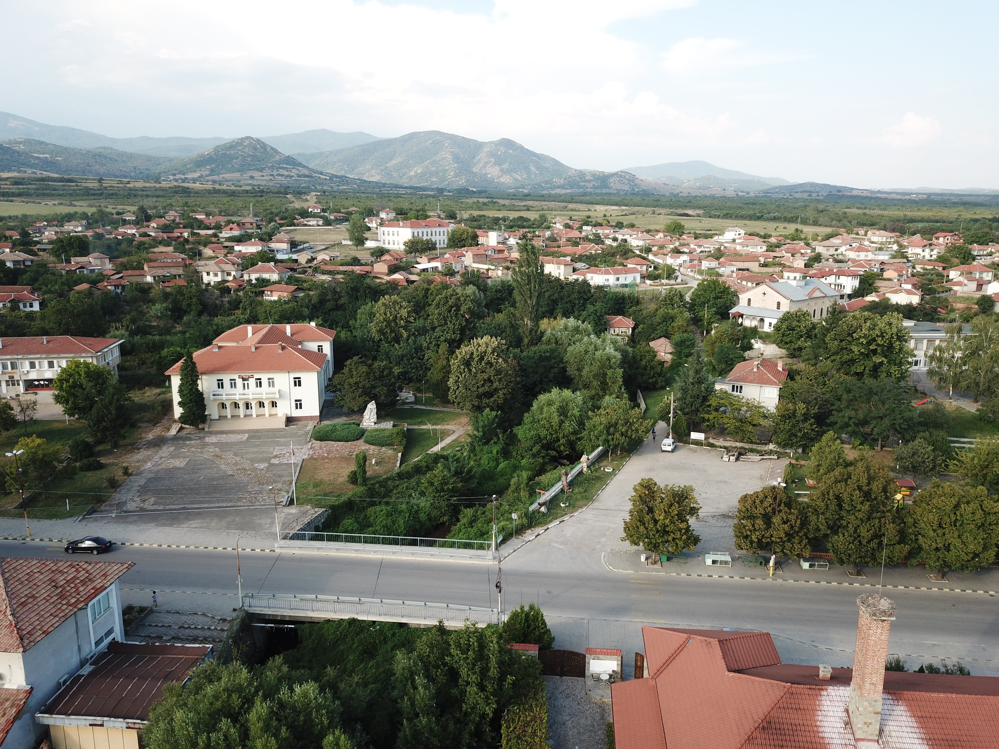 Изглед към с.Старосел